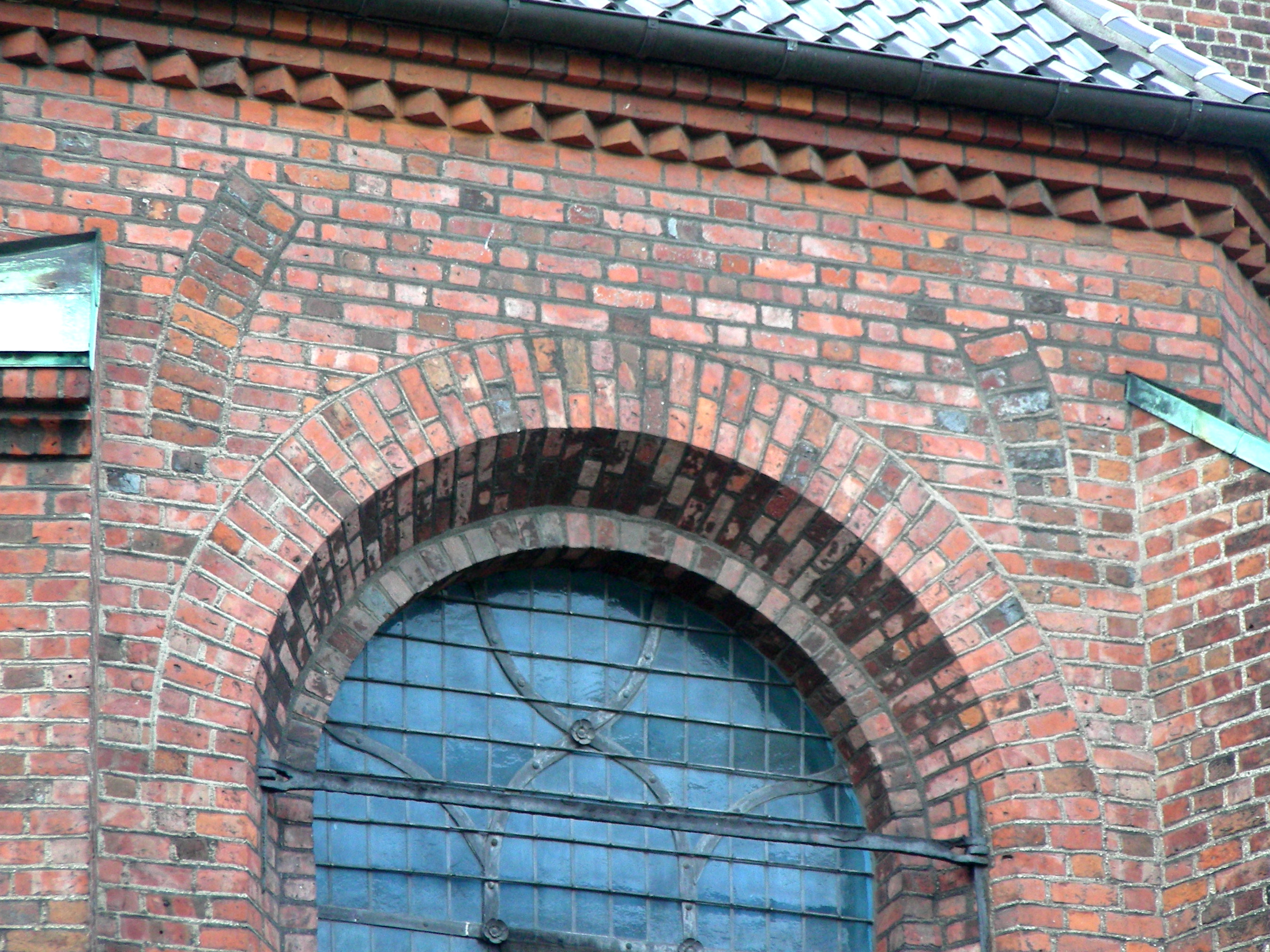 Helligåndskirken, Copenhagen, Denmark. Quire wall detail. Traces after older larger windows.